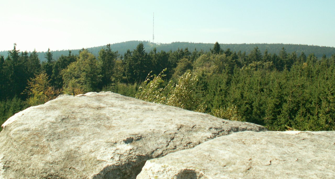 Javořice, pohled z Míchovy skály.